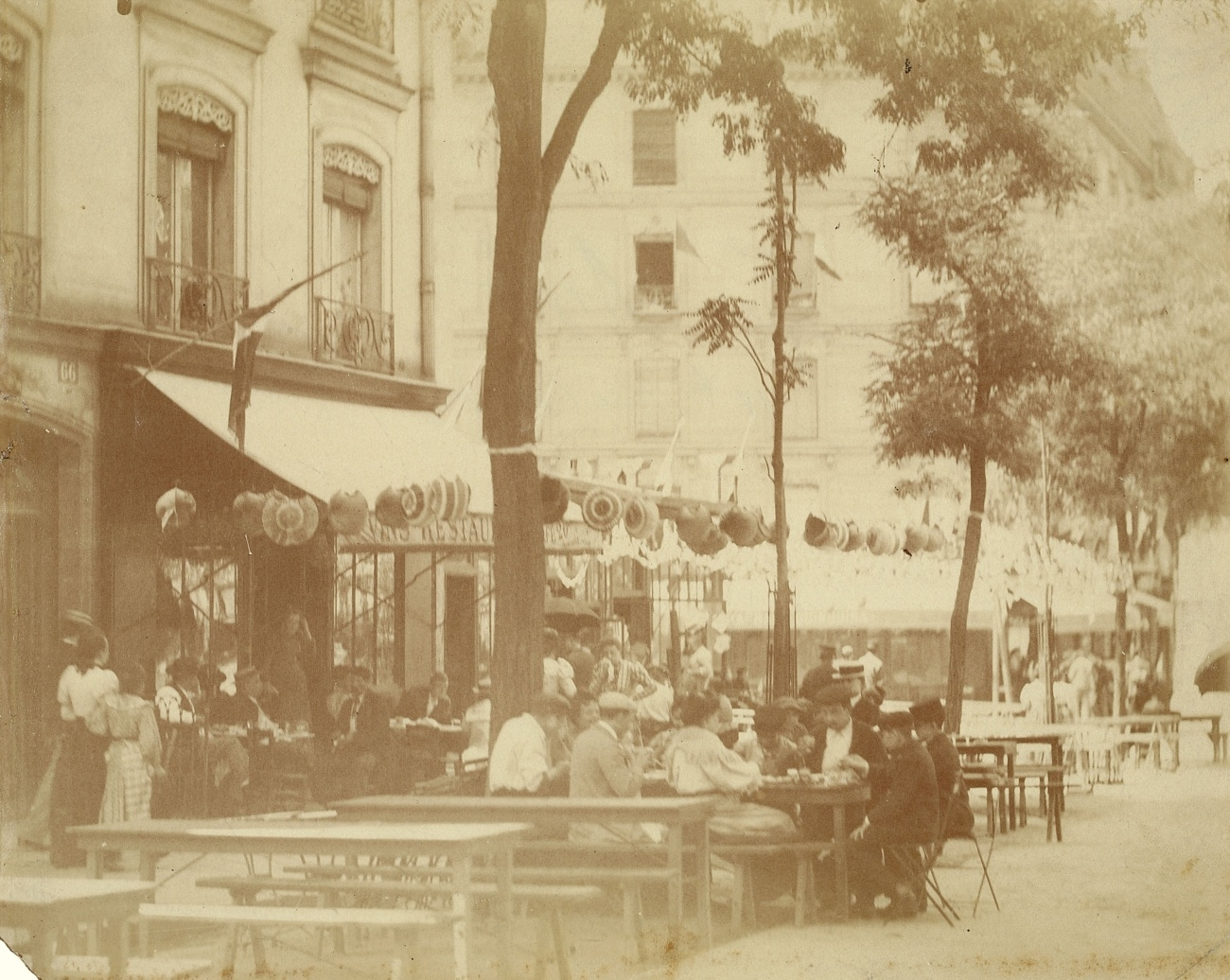 Place Sainte-Cathérine, Paris